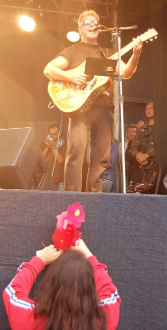 Acto de recuperación del terreno donde función el Centro Clandestino de Detención (CCD) de La Perla, Córdoba. Canta León Gieco.